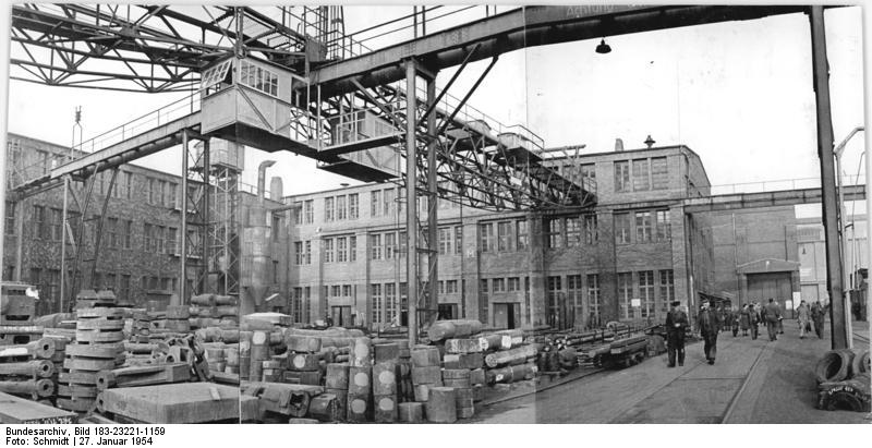 Erfurt, VEB Schwermaschinenbau "Henry Pels", Rohteillager Zentralbild TBD-Schmidt 27.1.1954 VEB Schwermaschinenbau "Henry Pels" Erfurt. Der Schwermaschinenbau "Henry Pels" in Erfurt ist einer der 33 Betriebe, die am 1. Januar 1954 von der Regierung der Sowjetunion dem deutschen Volke übergeben wurden. Das Werk liefert Scheren zum Schneiden von Blechen bis zu 40 mm Stärke und 4.000 mm Länge, Knüppelschweren zum Zertrennen von Stahlblöcken im kalten Zustande bis zu 260 qmm und für noch größere Blöcke in heissem Zustand. Ferner werden hier Kurbelpressen für Drücke bis zu 1250 zahlreiche Spezialmaschinen für die Ausrüstung von Walzwerken, Schiffswerften, Eisenbahnwerkstätten und Eisenkonstruktionsbetrieben gebaut. UBz: Das Rohteillager des Werkes. Die Materialvorräte gewährleisten einen ständigen, systematischen Arbeitsablauf. Die gesamte Lagerfläche wird von Brückenkränen bedient.